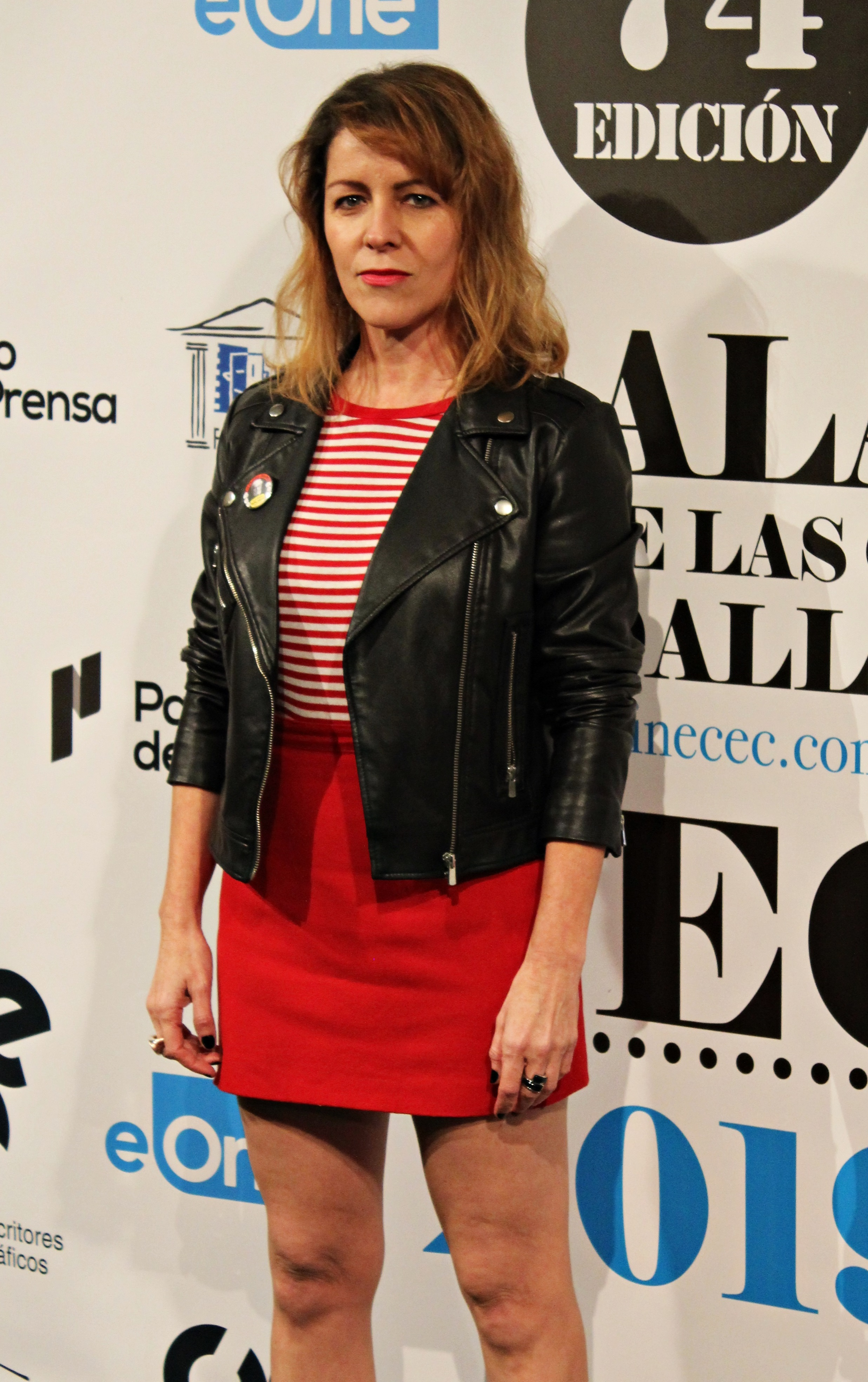 La actriz española Eva Llorach en la ceremonia de entrega de la 74 edición de las Medallas del Círculo de Escritores Cinematográficos.